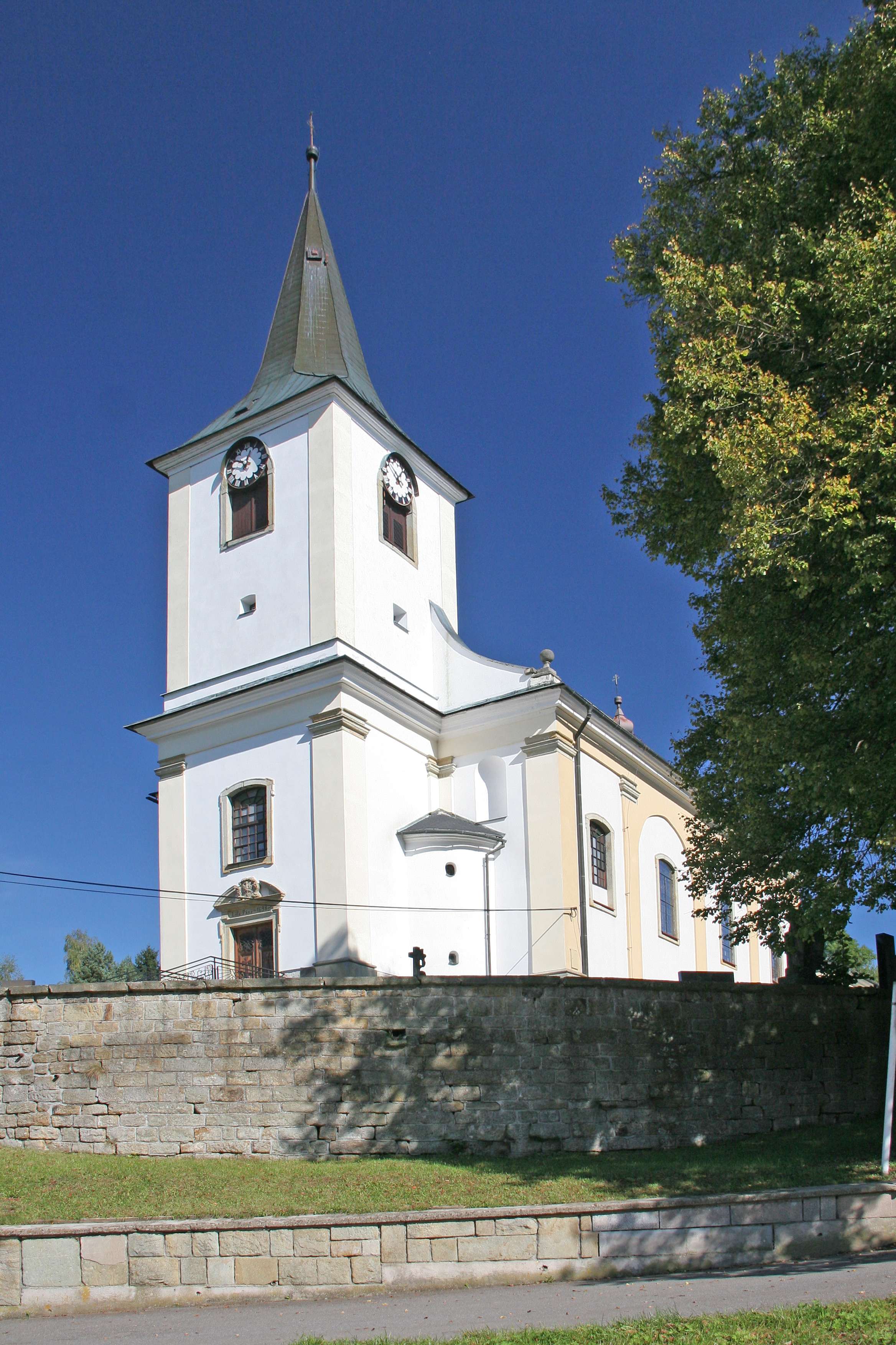 Kostel svatého Mikuláše, Nekoř.